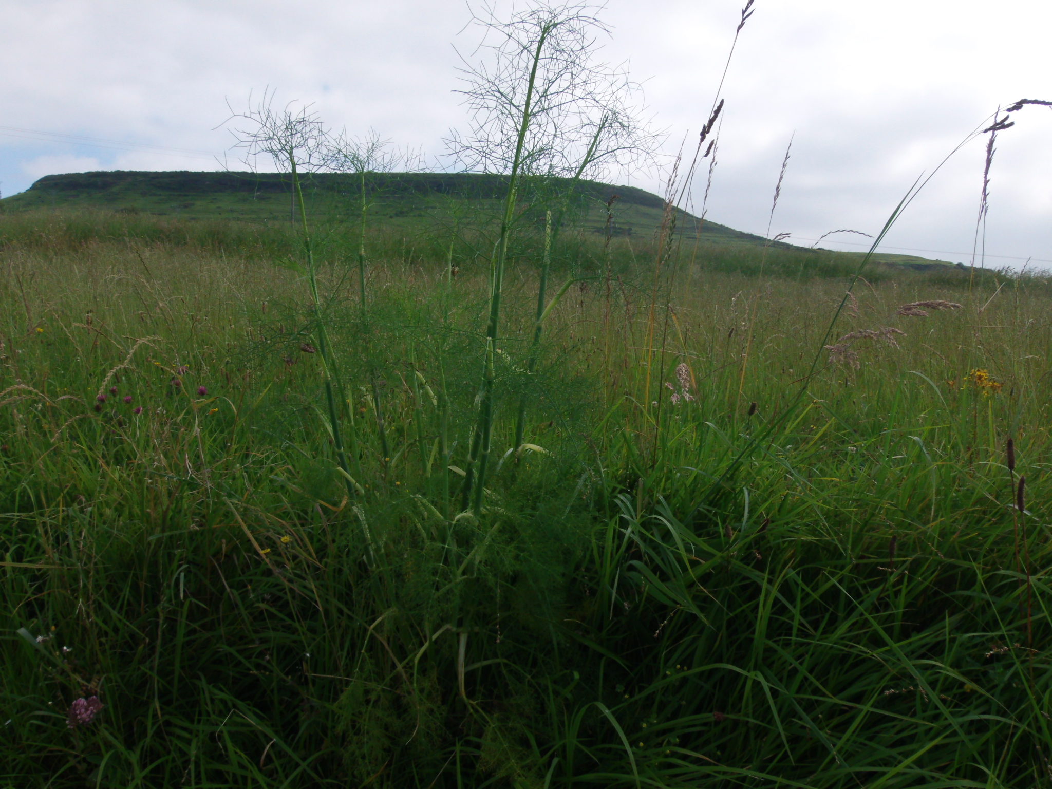 La silueta de Castíu, situada en Hinojedo, municipio de Suances (Cantabria)